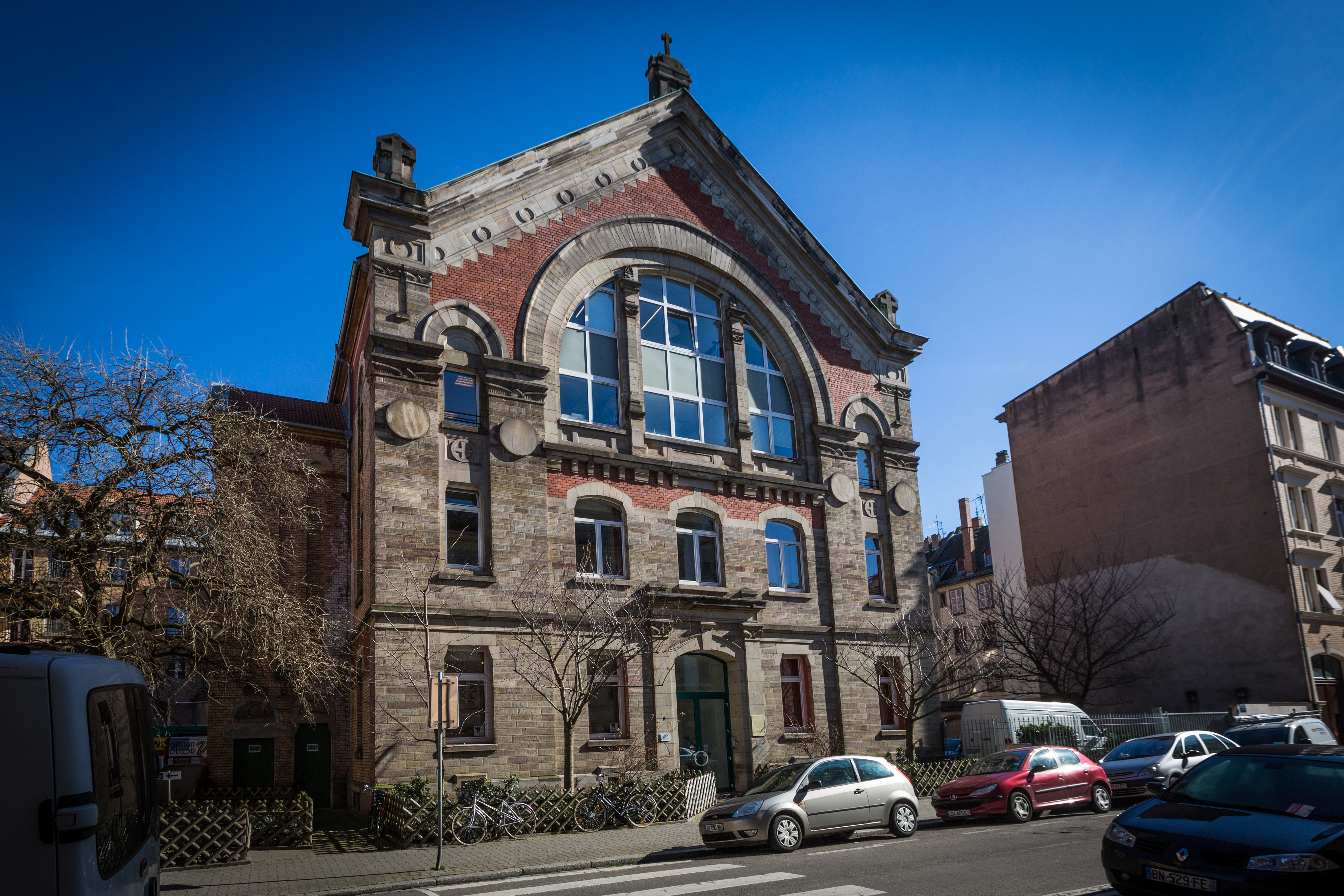 Strasbourg 8 rue du Fossé-des-Treize février 2014